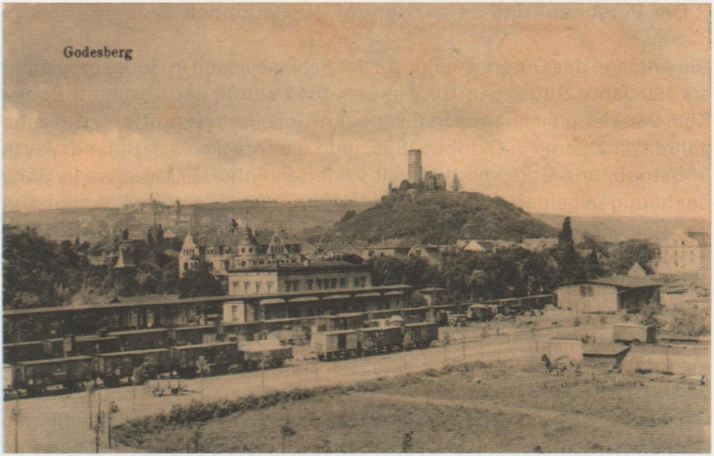 Erster Bahnhof von (Bad) Godesberg, dahinter der Burgberg der Godesburg